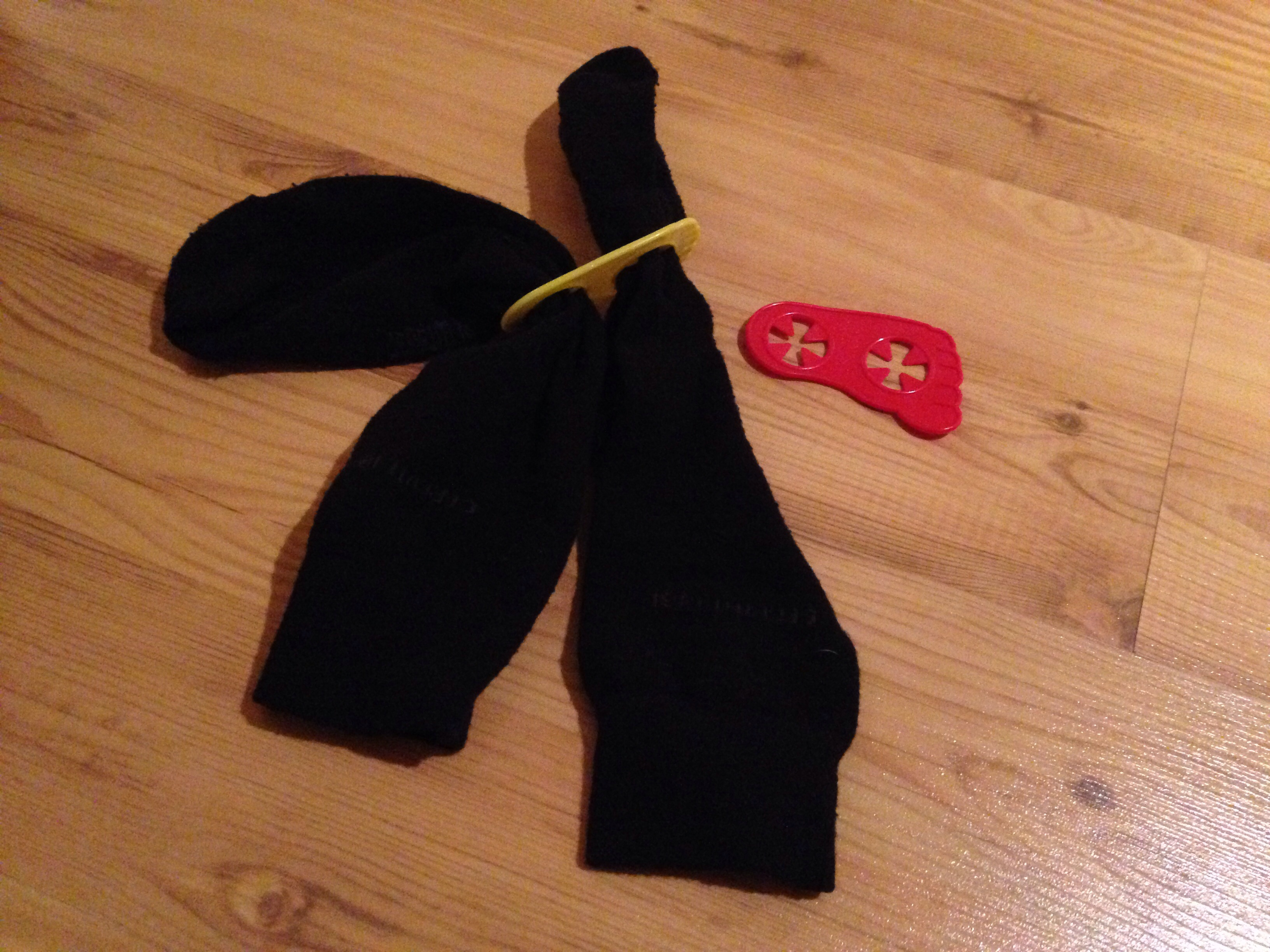 Sockenklammern